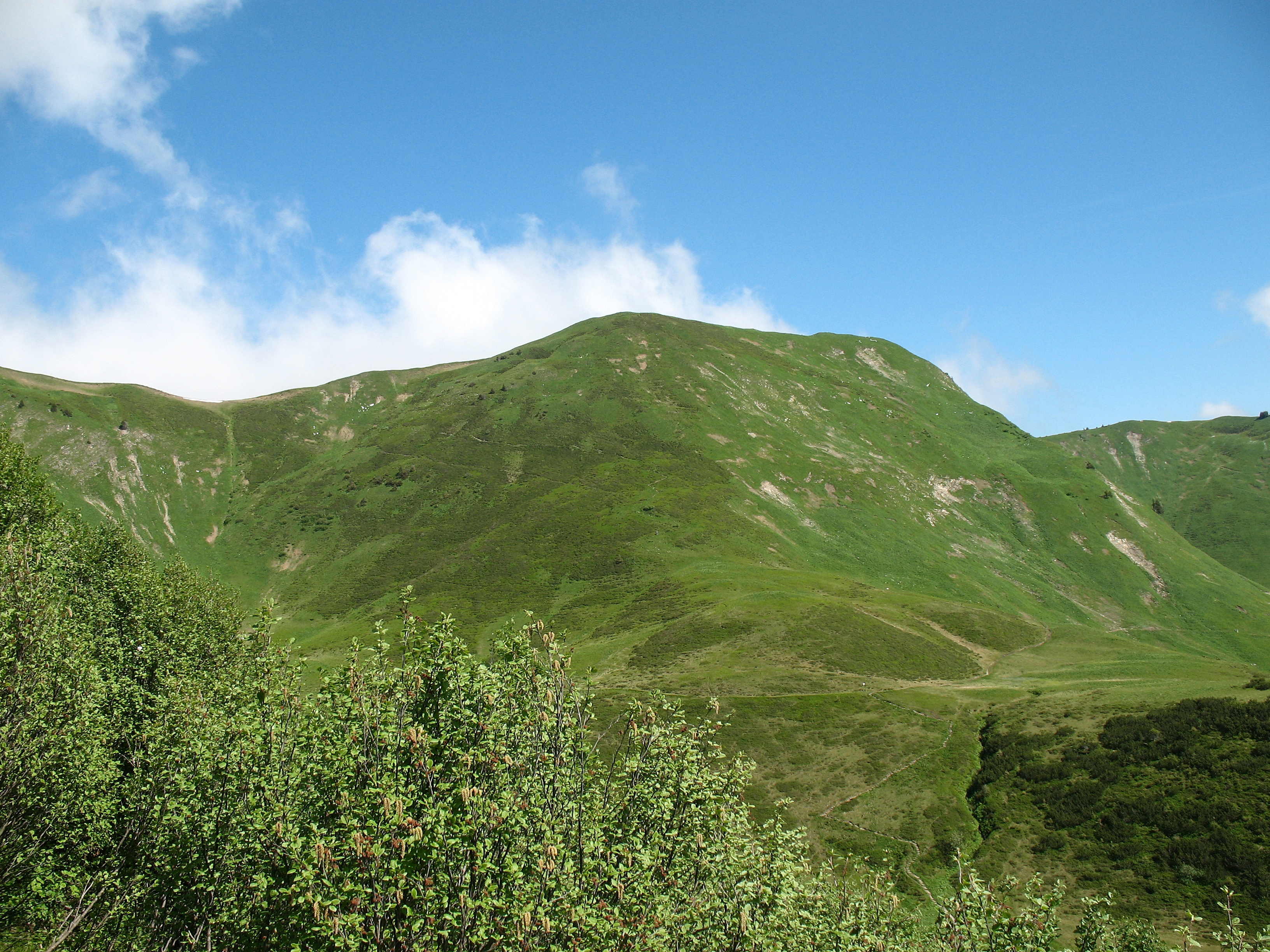 Schlappoltkopf (1968 m)